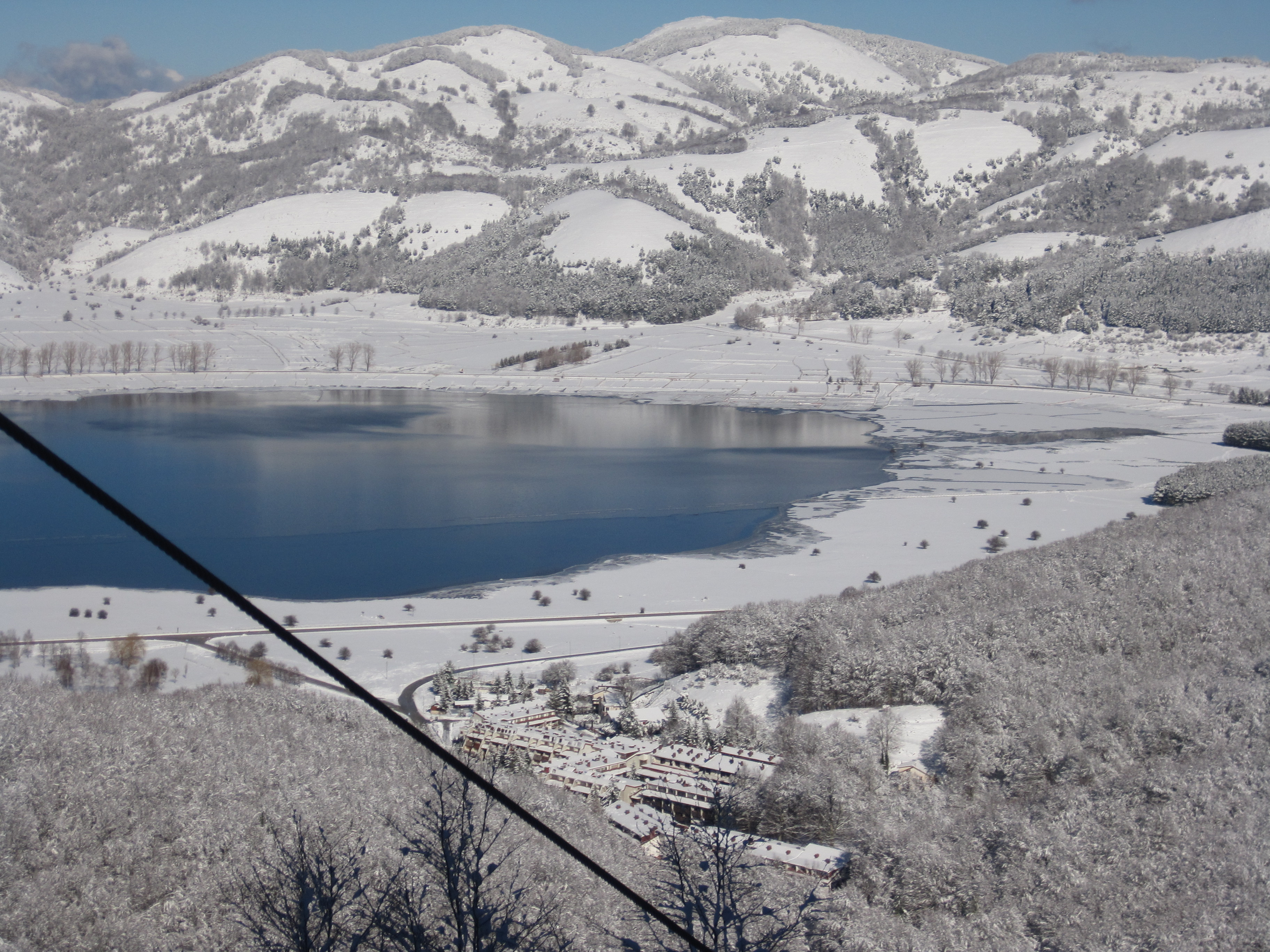 Foto scattata da me il 25 Gennaio 2011 dagli impianti di risalita (si può vedere la fune delle seggiovie nella foto).